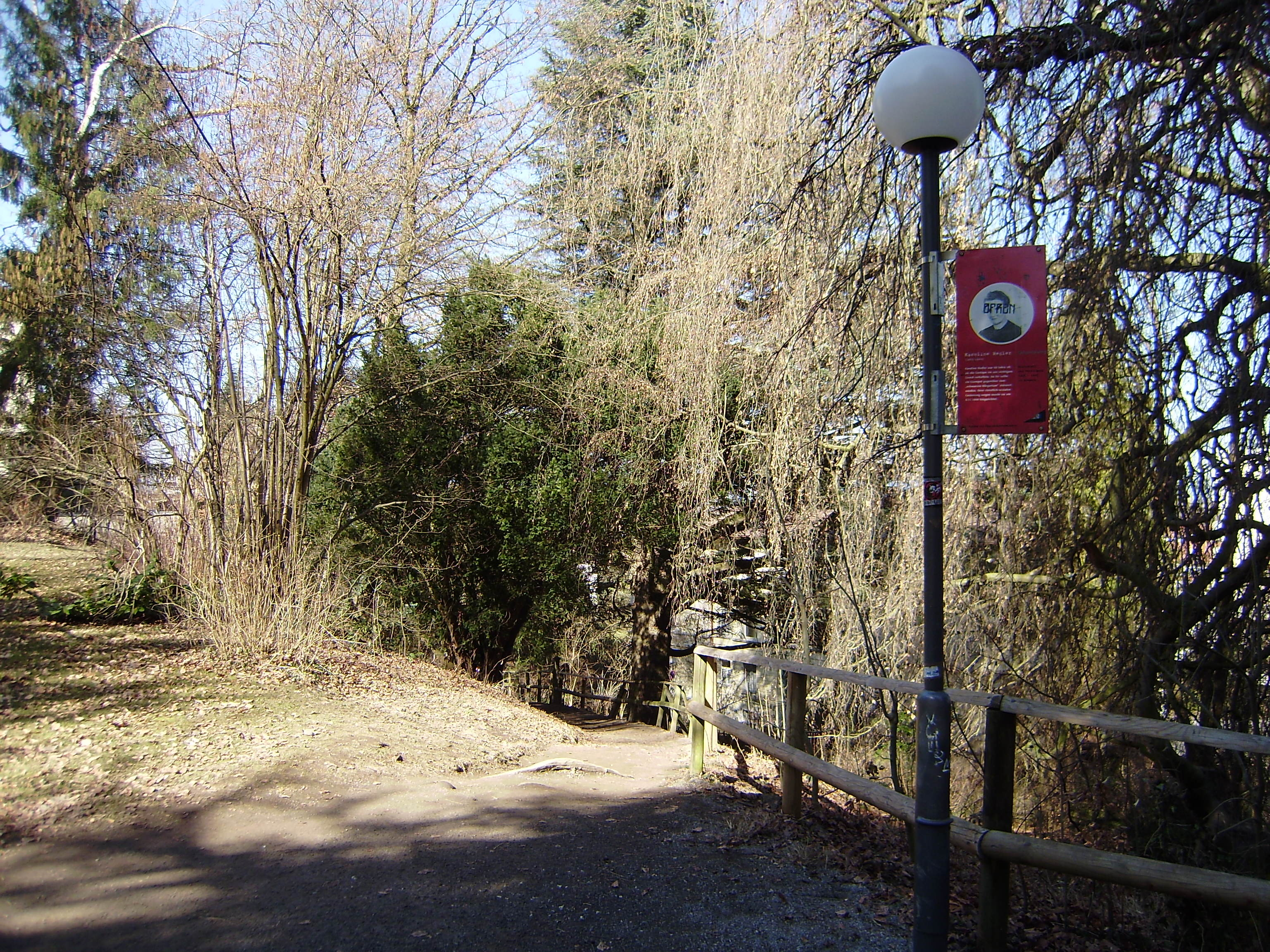 Erinnerungstafel am Karoline-Redler-Weg am Thurn-und-Taxis-Park in Bregenz (Vorarlberg)